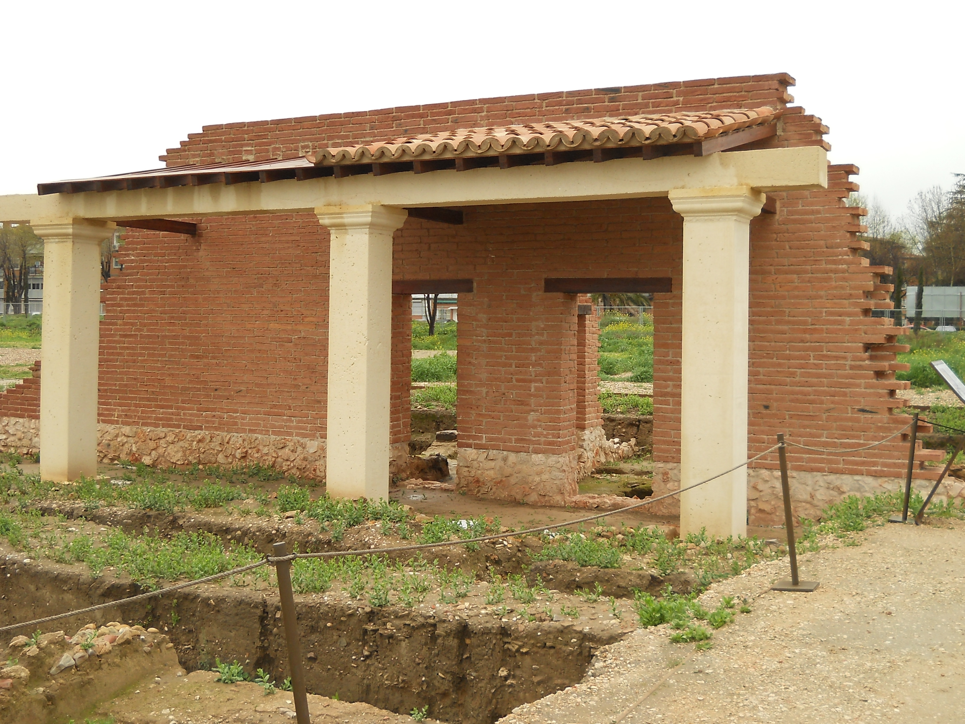 Auguraculum en el yacimiento de Complutum, Alcalá de Henares, Madrid, España